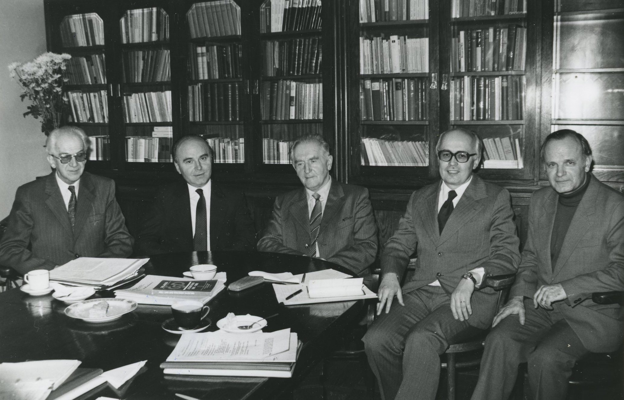 Synodní rada 1987 po 25. synodu 25.11.1987. Zleva: Náměstek syn. kurátora Vladimír Pistor, syn. senior Josef Hromádka, syn. kurátor Miloš Lešikar (zůstávající ve funkci), náměstek syn. seniora Pavel Smetana, RNDr. M. Litomský